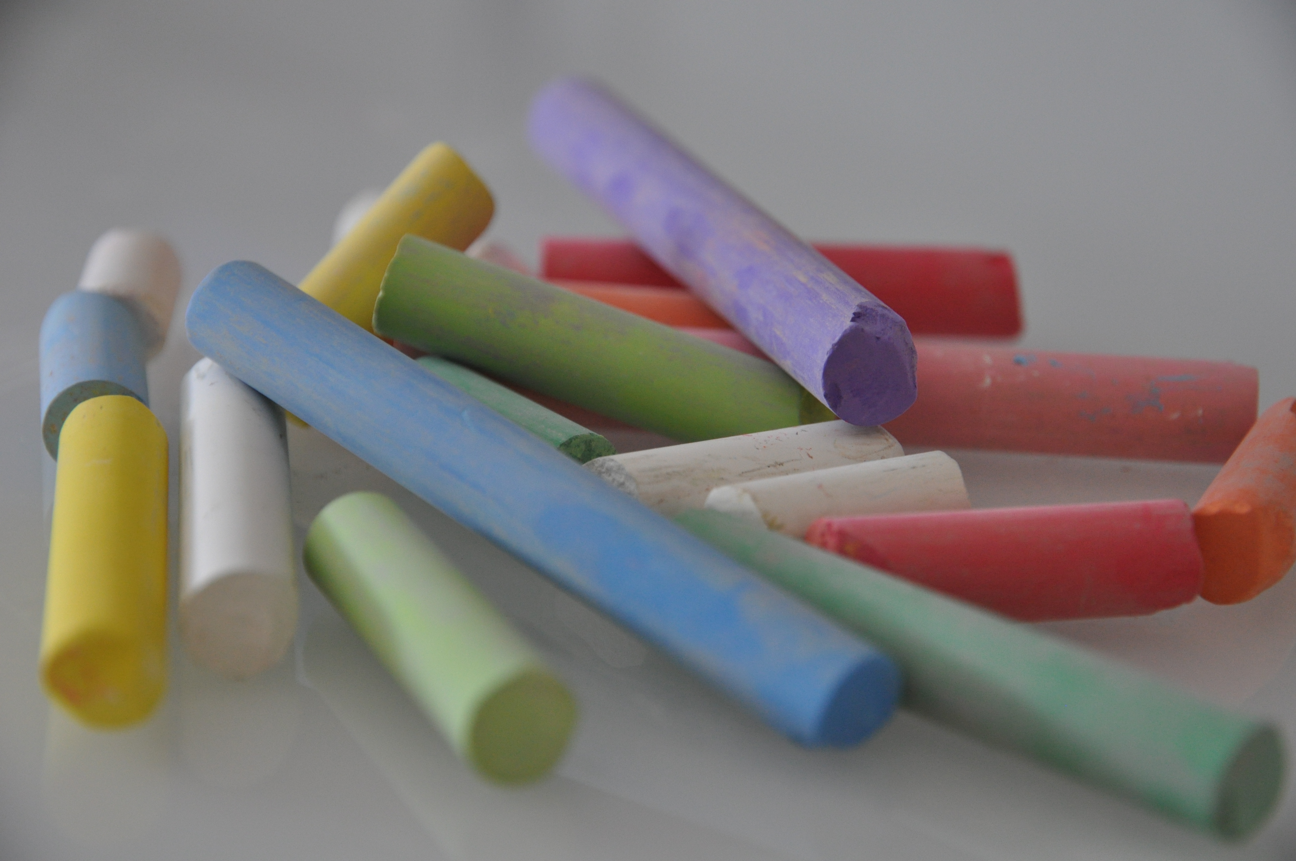 Gekleurde krijtjes.